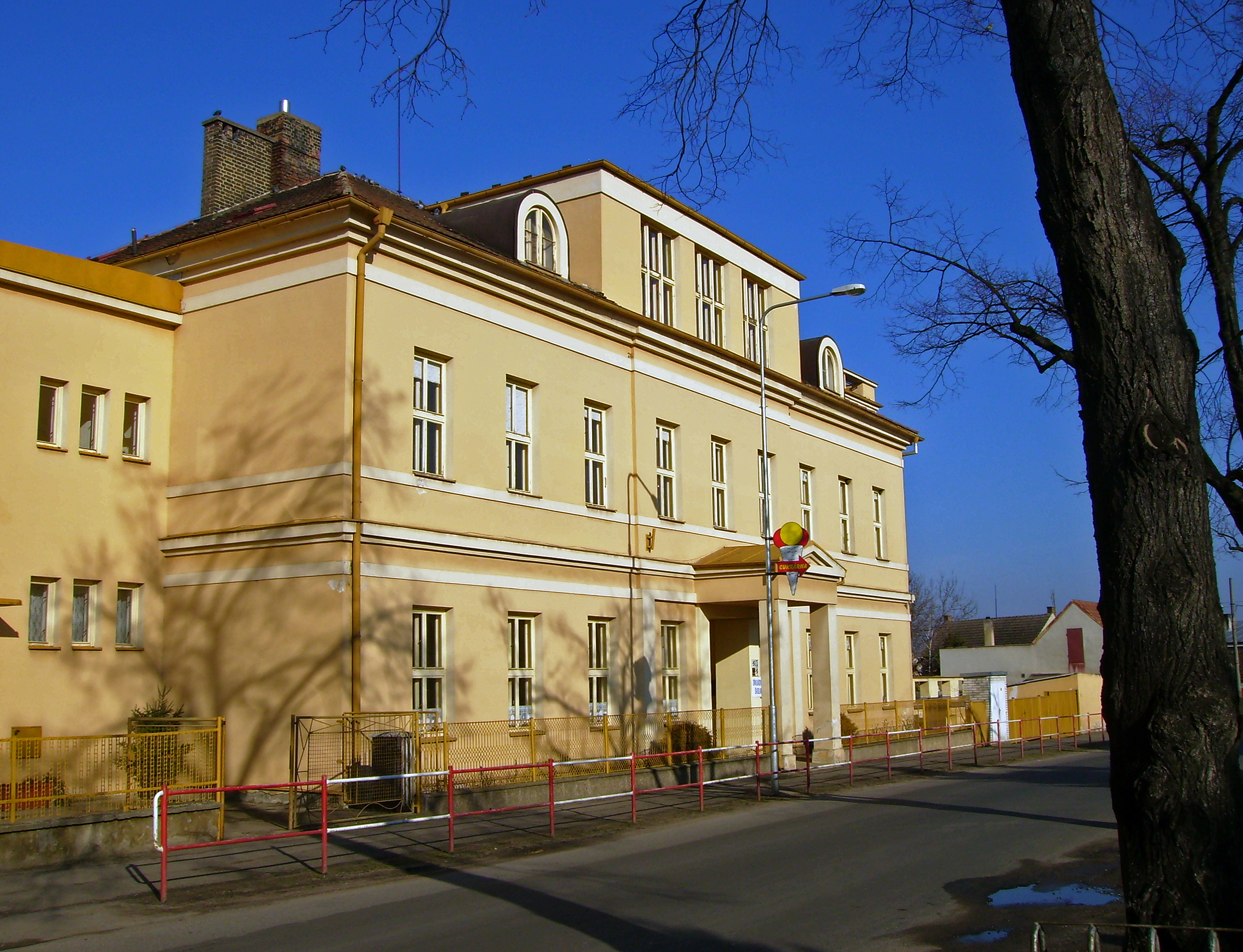 Škola v Přerově nad Labem.